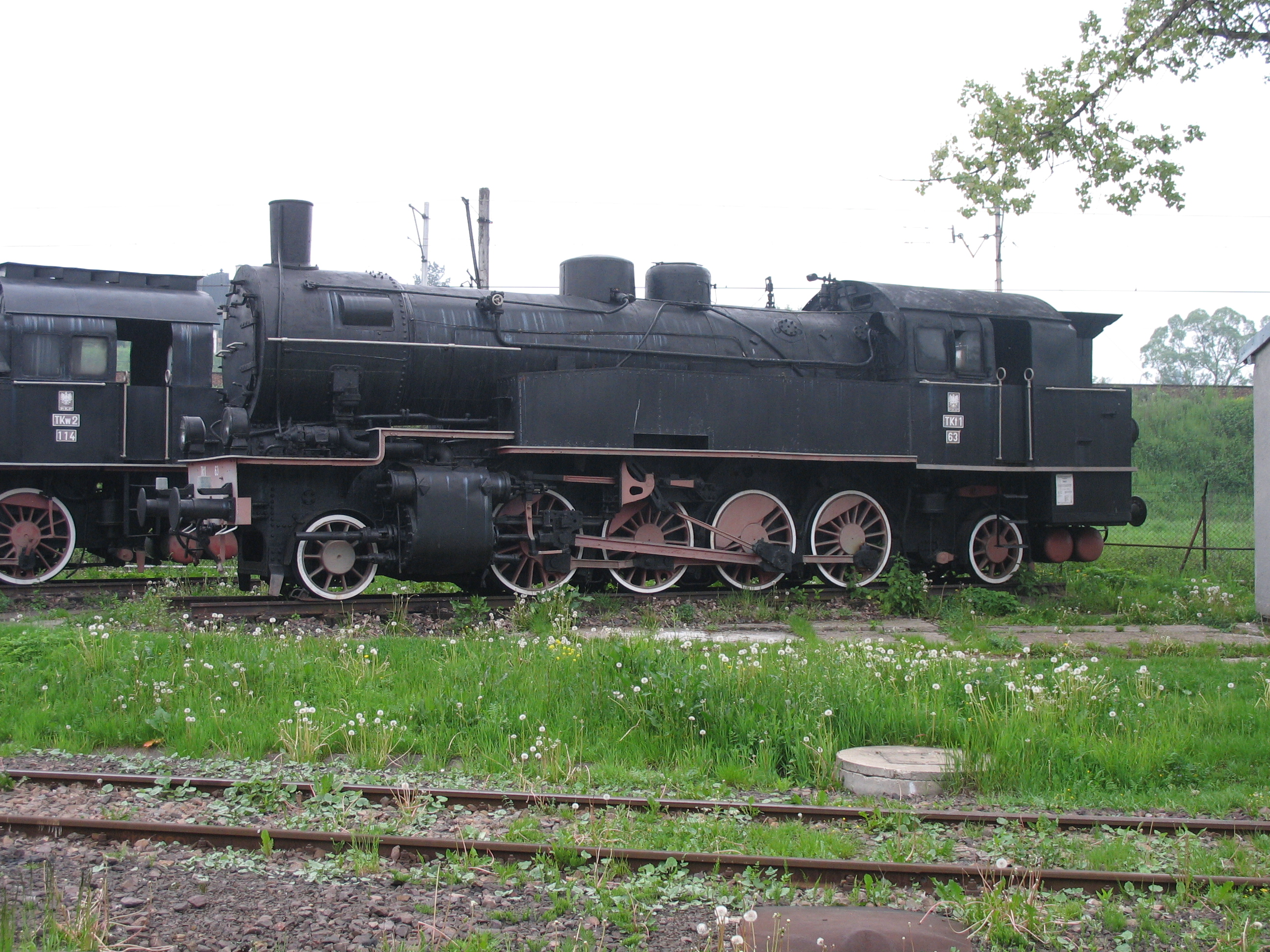 Lokomotywa parowa TKt1-63.